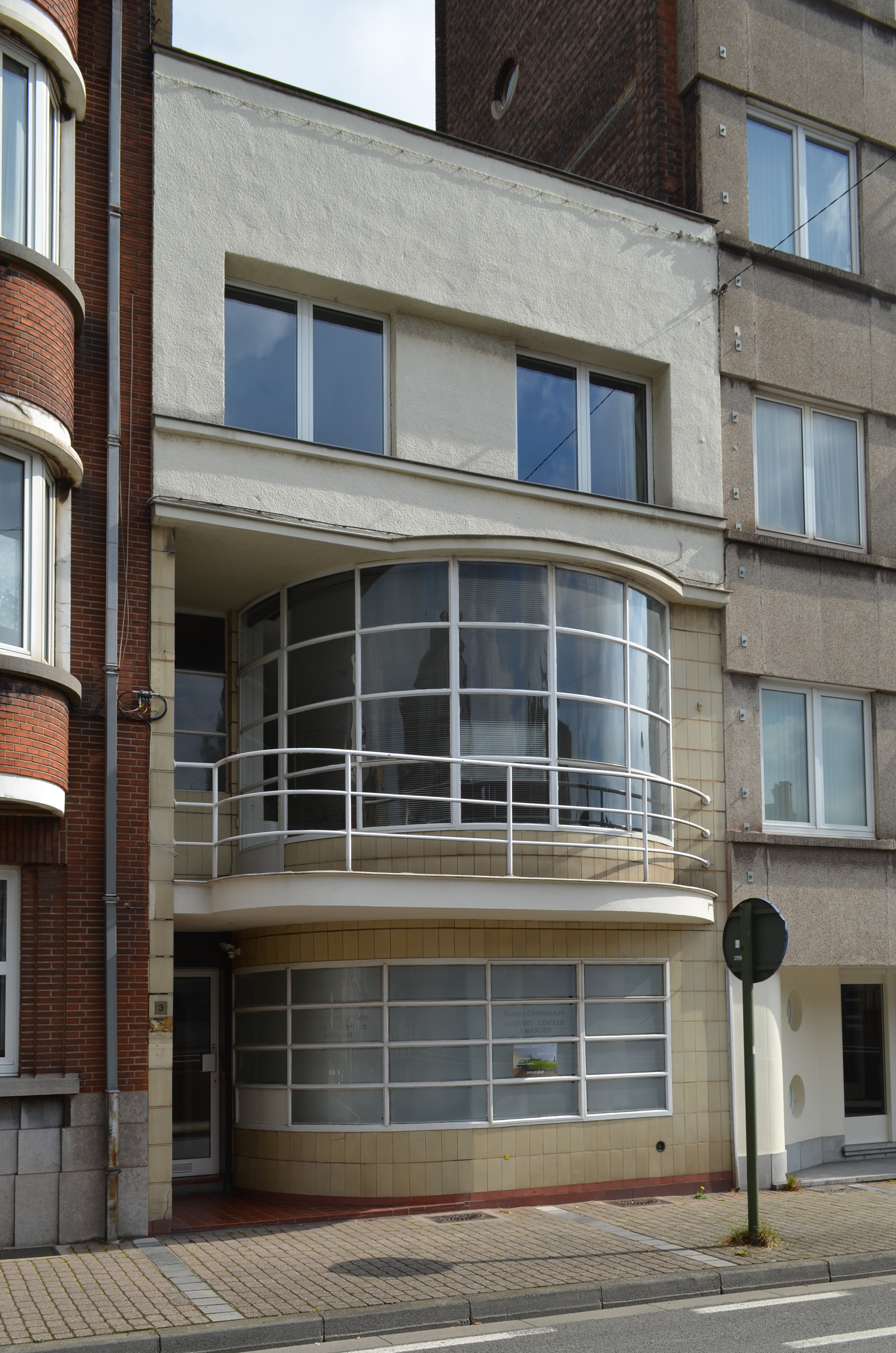 Charleroi (Belgique) - Boulevard Dewandre, 3 - Maison du gynécologue Mattot - Construction 1937. Architecte Marcel Leborgne. Façade de trois niveaux, dont les deux premiers sont amplement occupés par des parois vitrées courbes rappelant le style paquebot. Frise de tuileaux aujourd'hui disparue. Source : Le patrimoine monumental de la Belgique, vol. 20 : Wallonie, Hainaut, Arrondissement de Charleroi, Liège, Pierre Mardaga, éditeur, 1994, 602 p., p. 87, (ISBN 2-87009-588-0)